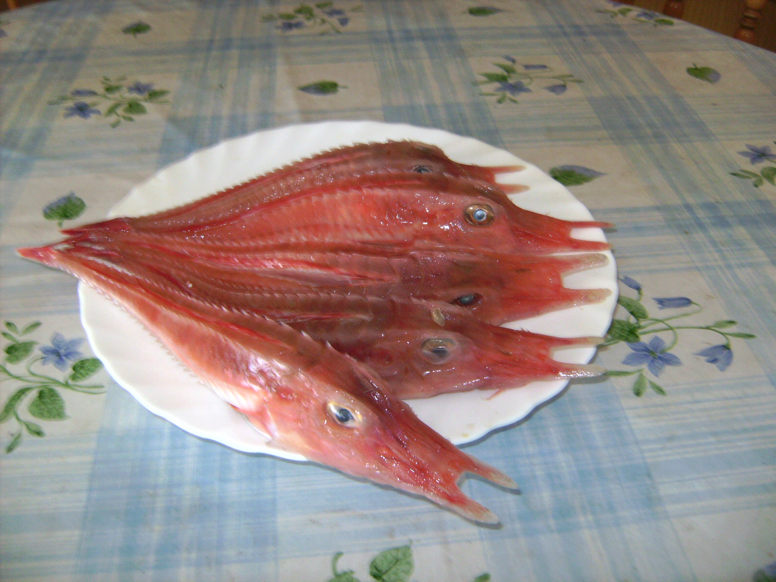 Plato con malarmaos (Peristedion cataphractum) en El Puerto de Santa María, Cádiz (España). Esta especie recibe diversos nombres en los puertos de Andalucía: Malarmado, Malarmao, Armado, Armadillo, Cabrilla, Carrozo o Garneo.